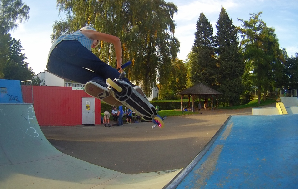 Stuntscooter in Half-Pipe